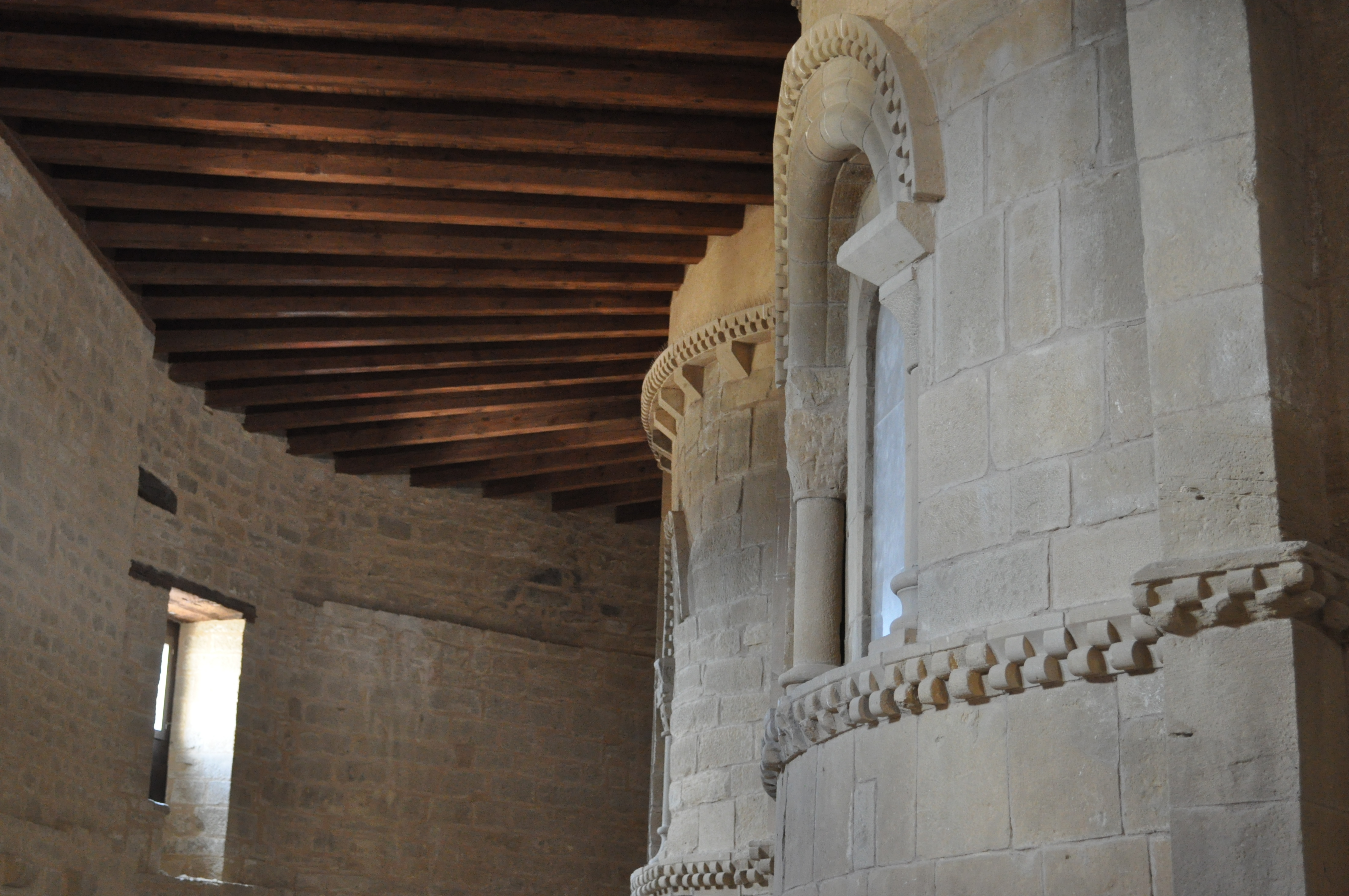 Vista Exterior del abside